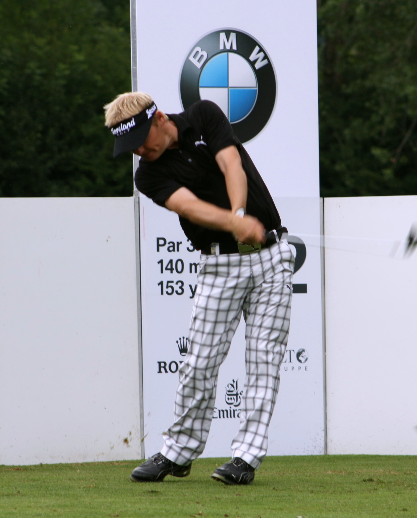 23. BMW International Open bei München. Golfer Soren Kjeldsen.